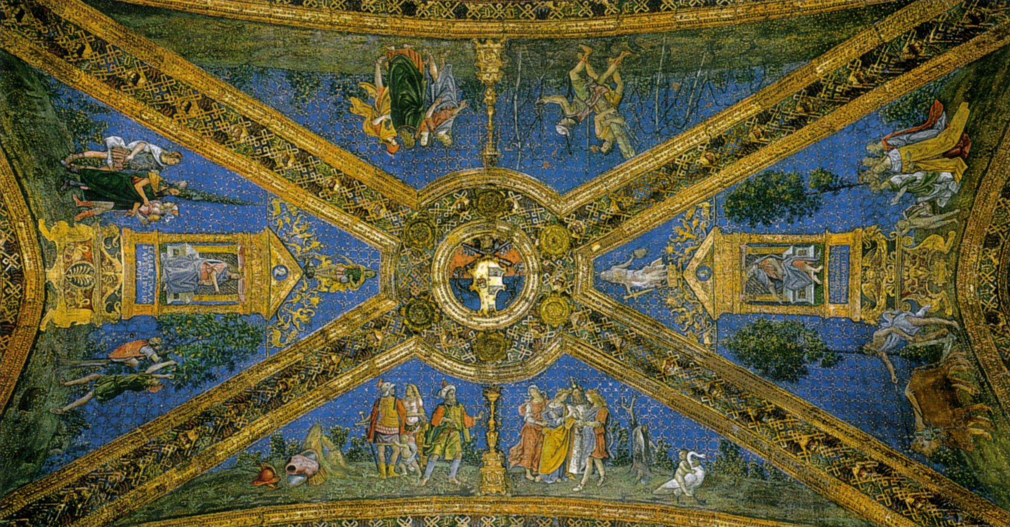 Appartamento borgia, sala dei santi, episodi del mito di iside e osiride